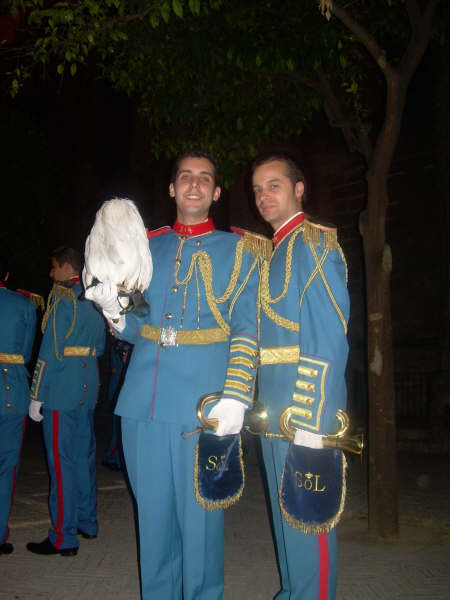 Musicos de la Banda del Sol (Sevilla) en las Lágrimas de San Pedro